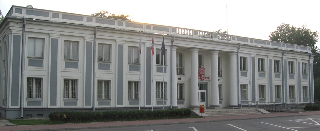 Budynek starostwa w Mielcu, przy ul. Sękowskiego 2b.